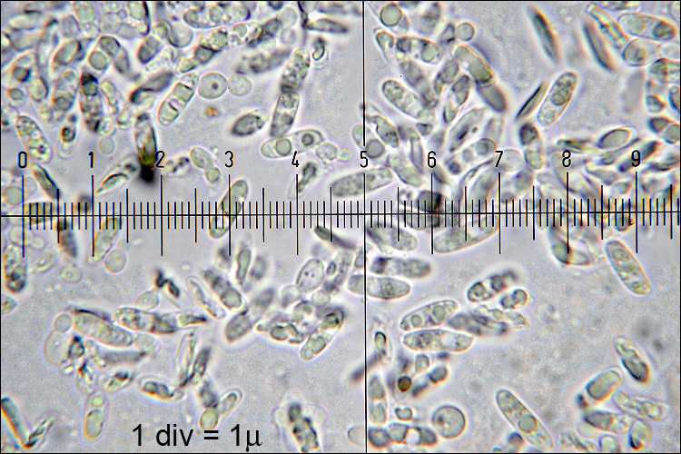 Polyporus varius (Pers.) Fr.